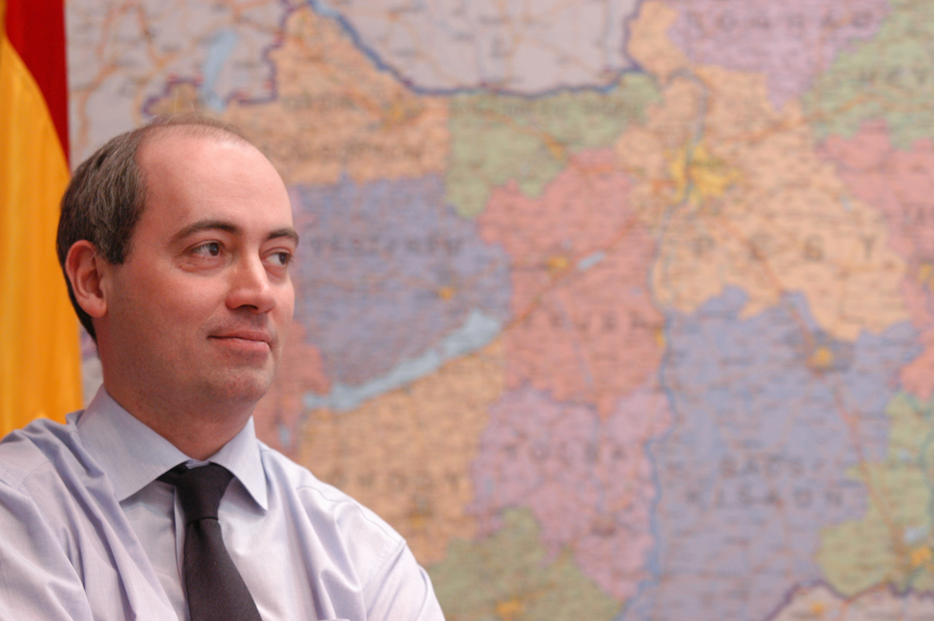 Josep María de Sagarra Àngel